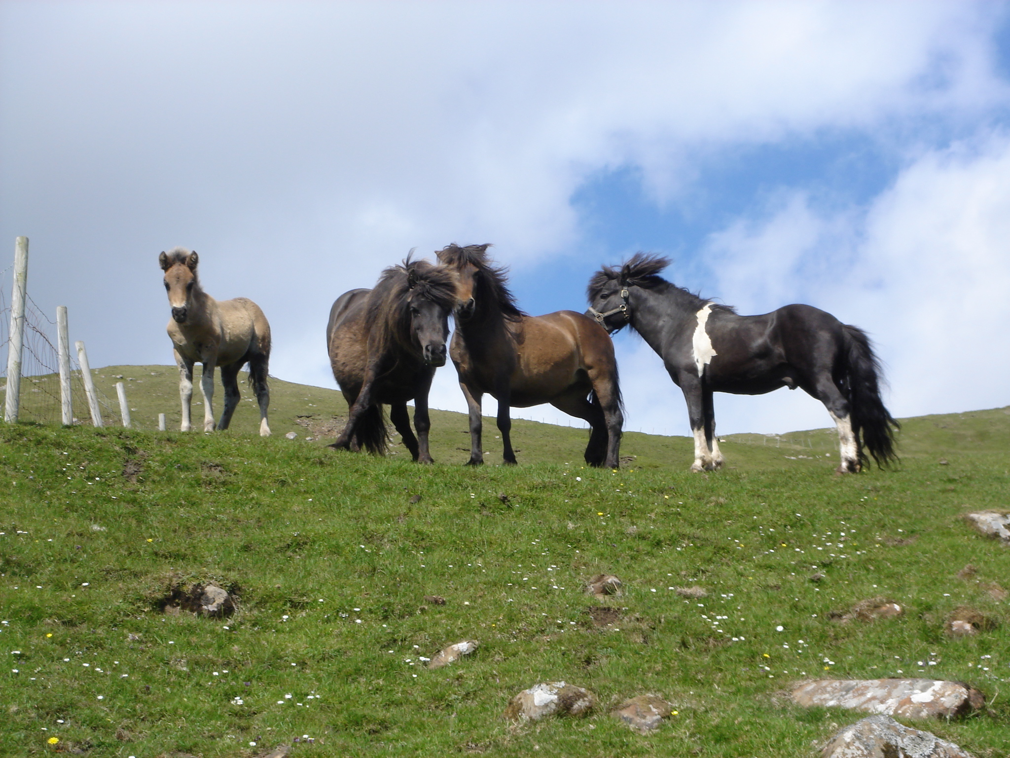 Færøske heste